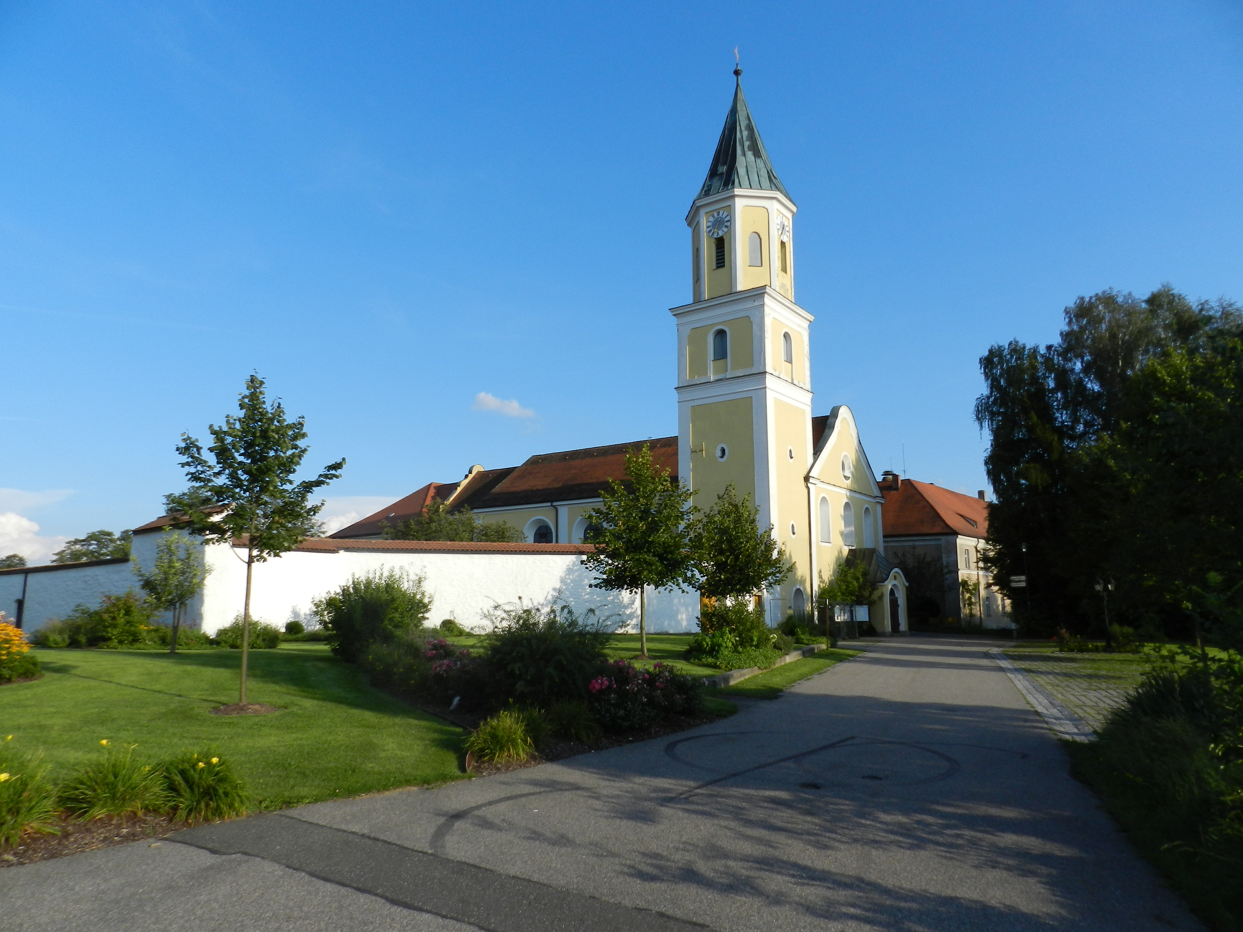 Schönthal, Landkreis Cham, Kirche St. Michael, früher Kloster (2011)